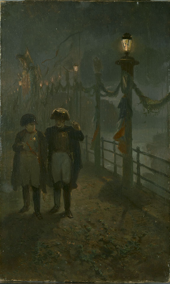 schilderij; Vos, Jacob de; geschiedenis (iconografie); nocturne; Napoleon Bonaparte